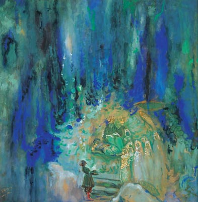 Садко (1911) 110 шедевров Россия & СССР. Искусство, литература, театр в 1905-1940 гг. «Подводное царство», композиция по одноименному фантастическому балету на музыку из оперы «Садко» Н. Римского-Корсакова «Русские сезоны» за границей, антреприза С. Дягилева, Париж, театр Шатле, 1911 Подписан и датирован 1914 г. Серая б., кар., гуашь, бронзовая и серебряная краска 71,5 х 69,7 Приобретен в 1963 г. у М. Г. Гордеева Бахрушинский музей